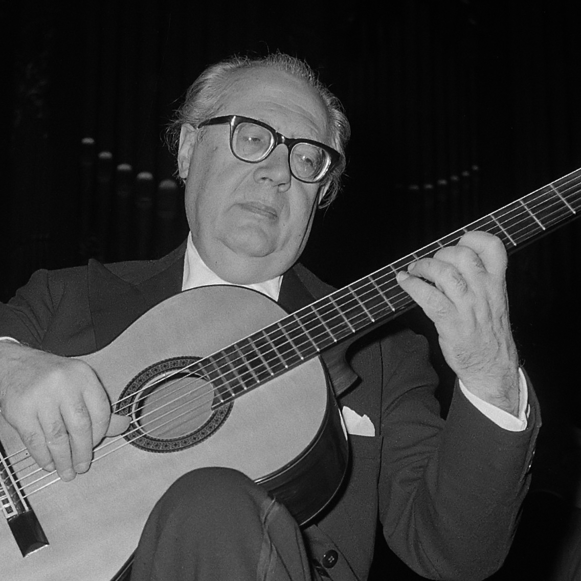 Andres Segovia in het Concertgebouw 3 november 1962